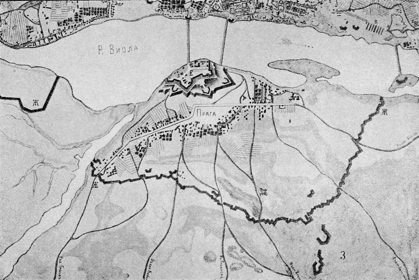 Данное изображение было использовано в статье «Варшава» опубликованной в пятом томе «Военной энциклопедии», который был издан книгоиздательским товариществом Ивана Дмитриевича Сытина в 1911 году в столице Российской империи городе Санкт-Петербурге.